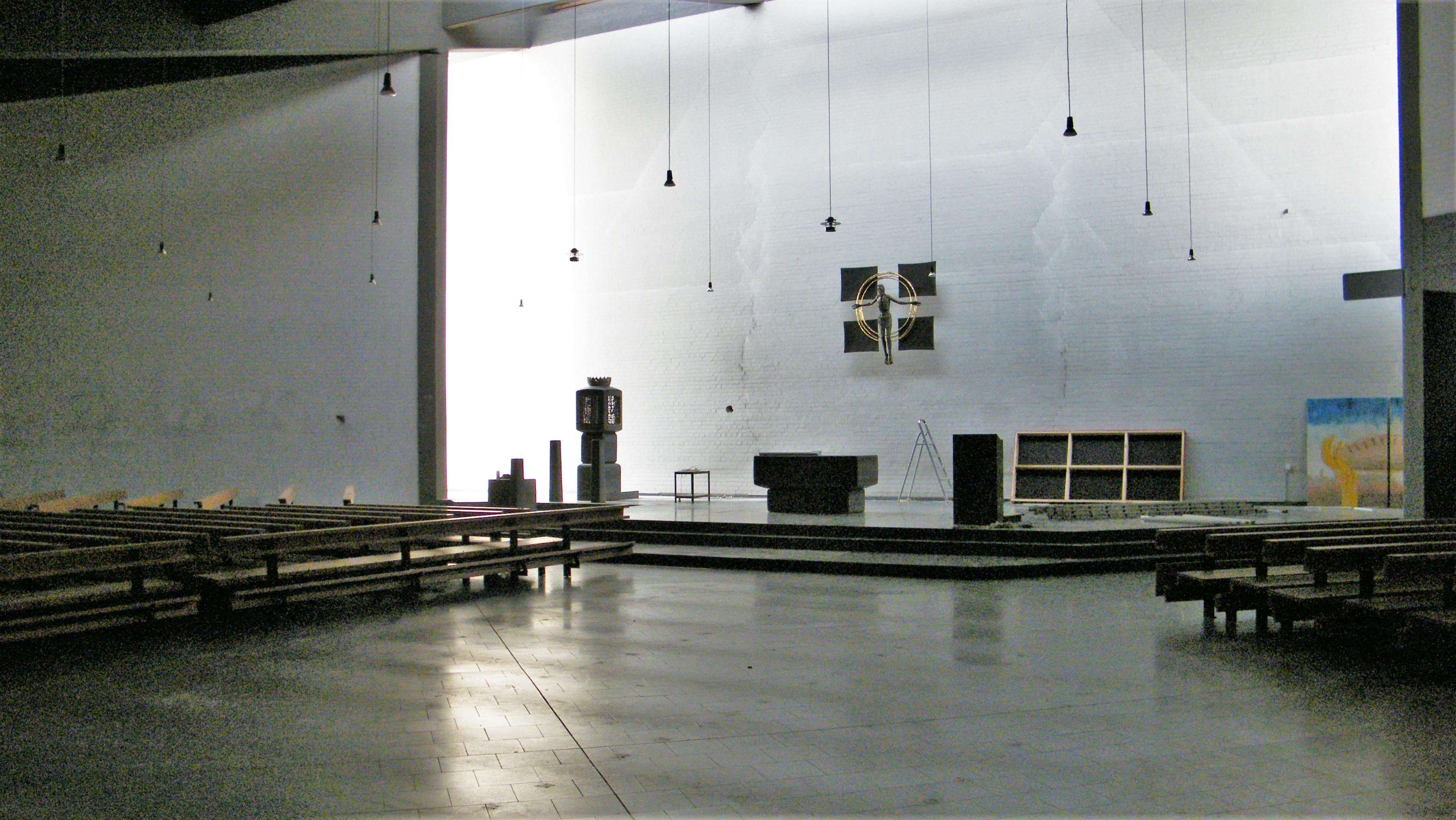 Altar St. Elisabeth Riegelsberg